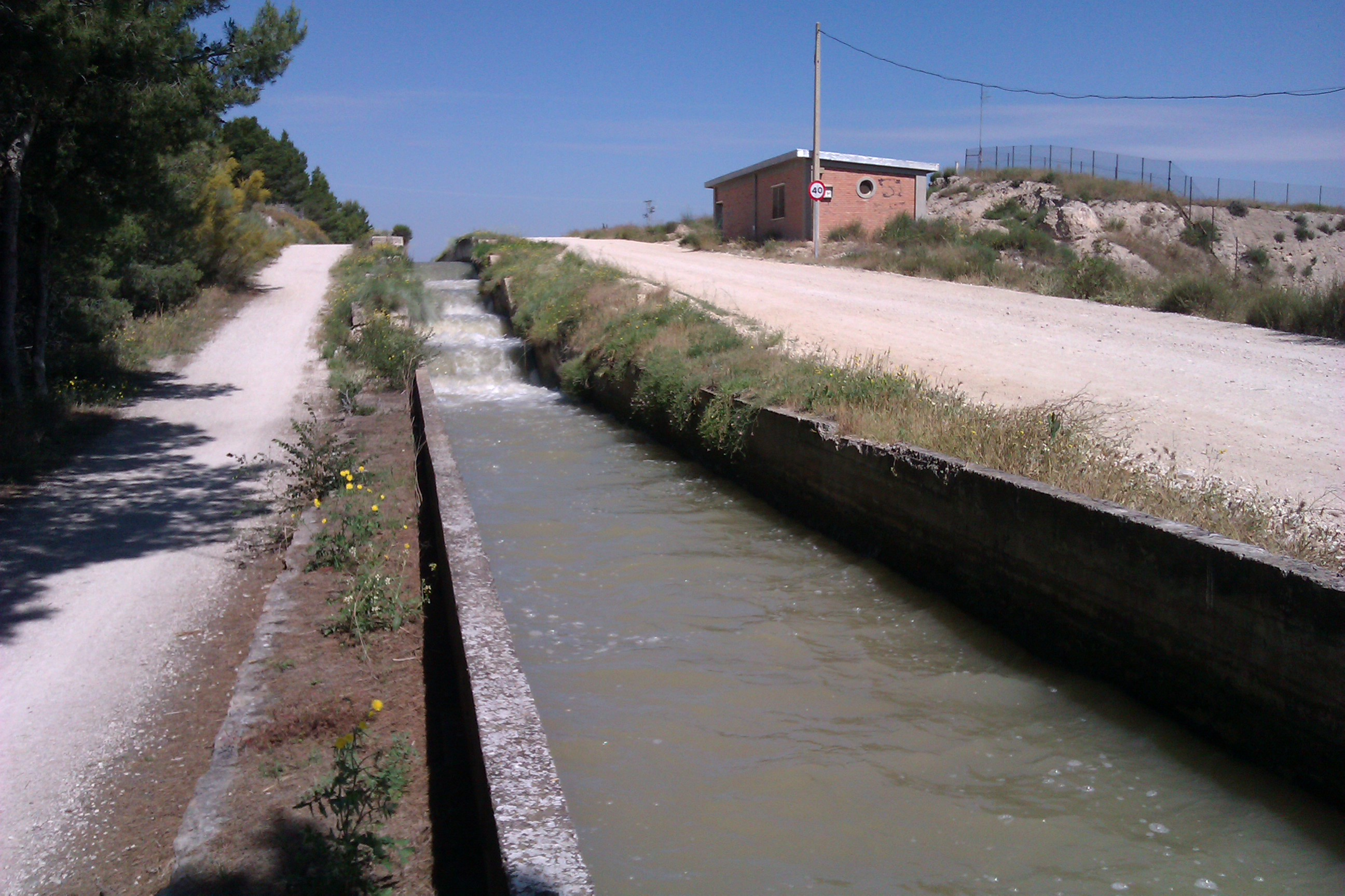 Canal Imperial dimpu�s d'as inclusas de Val de Gurriana